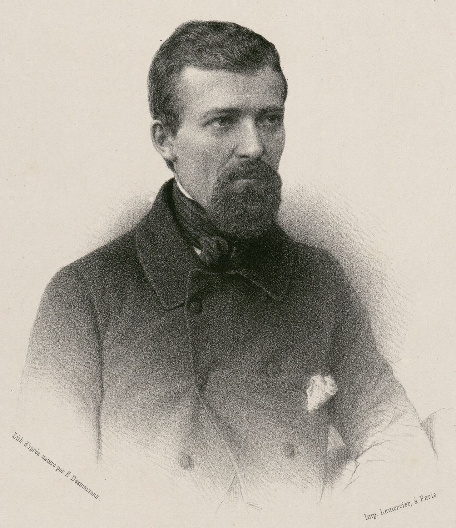 Albert (Martin-Alexandre) Né à Bury (Oise), le 27 avril 1815, membre du Gouvernement provisoire le 24 février 1848. Vice-président de la Commission du Gouvernement pour les travailleurs.